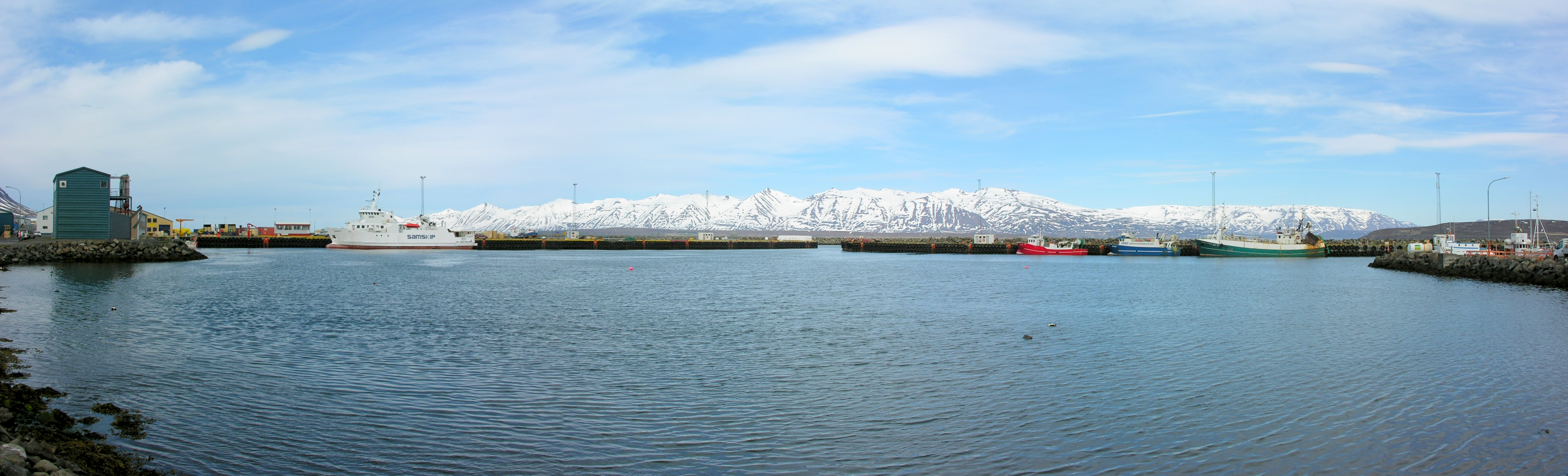 Dalvík Harbour